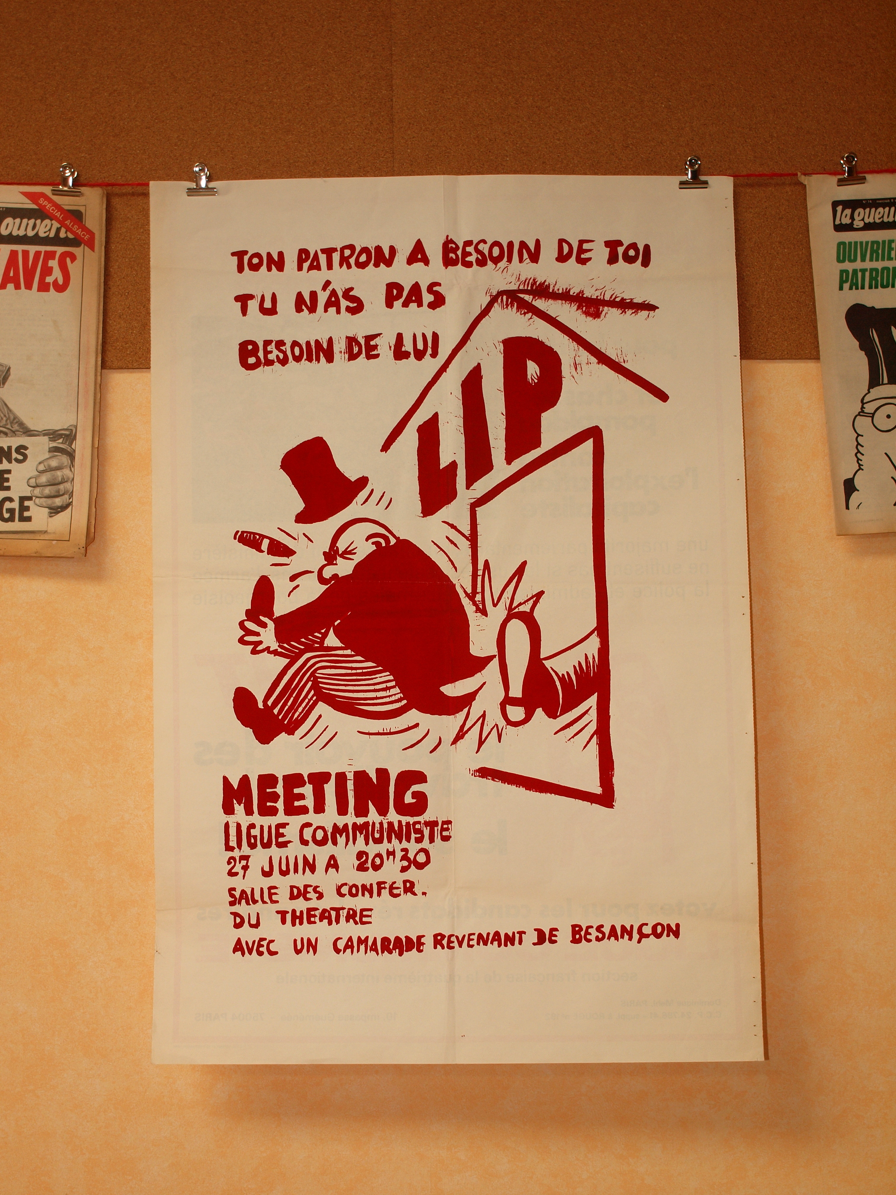 Exposition Mai 68 et la suite..., à Villeneuve-la-Guyard (Yonne, France) , du 22 au 29 mai 2018